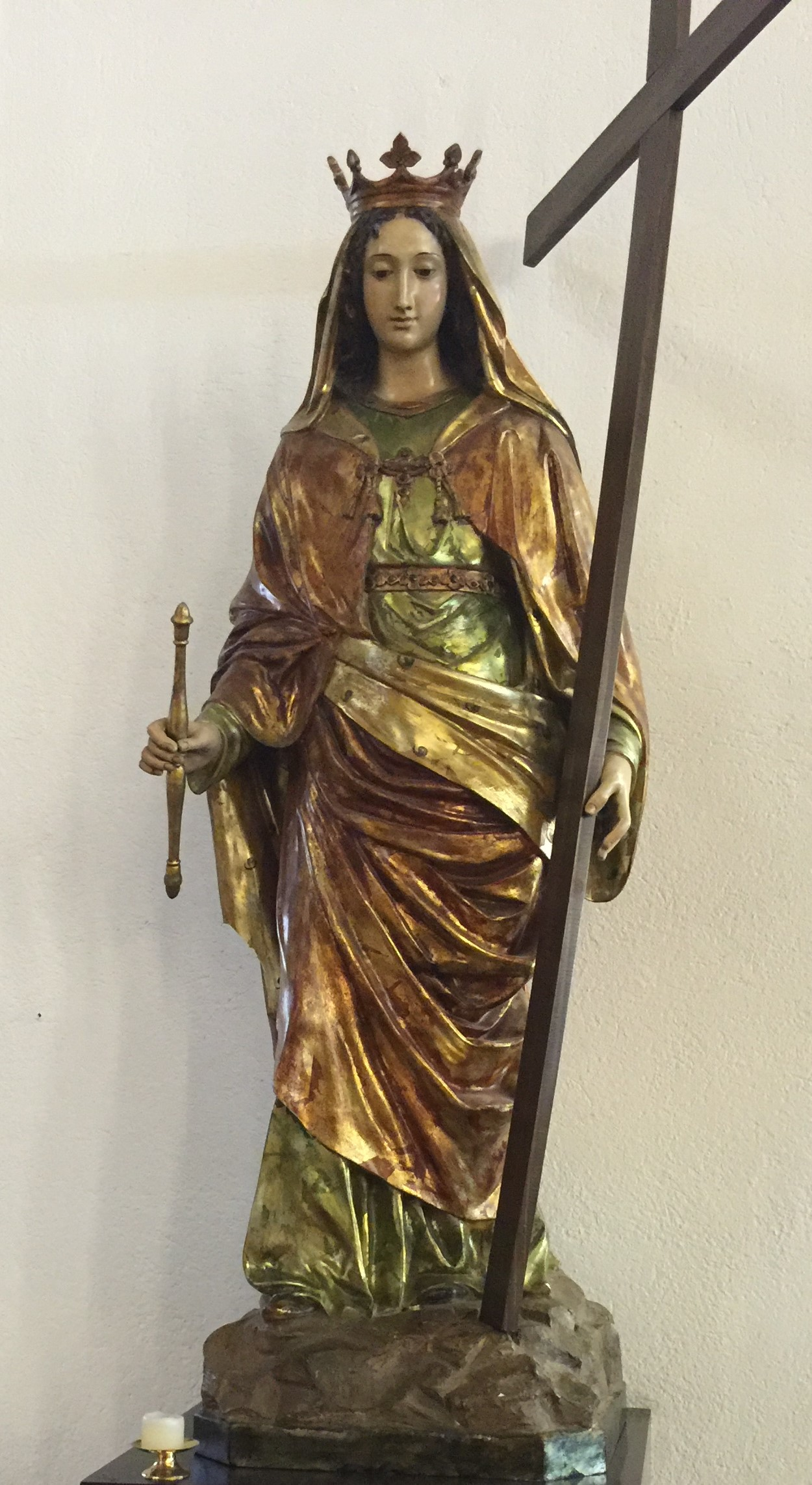 Escultura de Santa Elena de Peter Horn Werner, nació en Munich, Alemania, el 8 de abril de 1908 y falleció en Santiago de Chile, el 11 de abril de 1969. Fue un connotado escultor religioso alemán - chileno. Esta escultura se encuentra en la Parroquia ee Santa Elena , comuna de Las Condes, Santiago de Chile